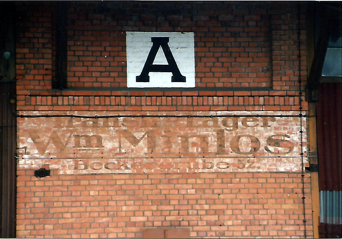 Verblassendes Firmenschild "Transitlager Wm. Minlos Beckergrube 52" an Schuppen A auf der Nördlichen Wallhalbinsel im Lübecker Hafen